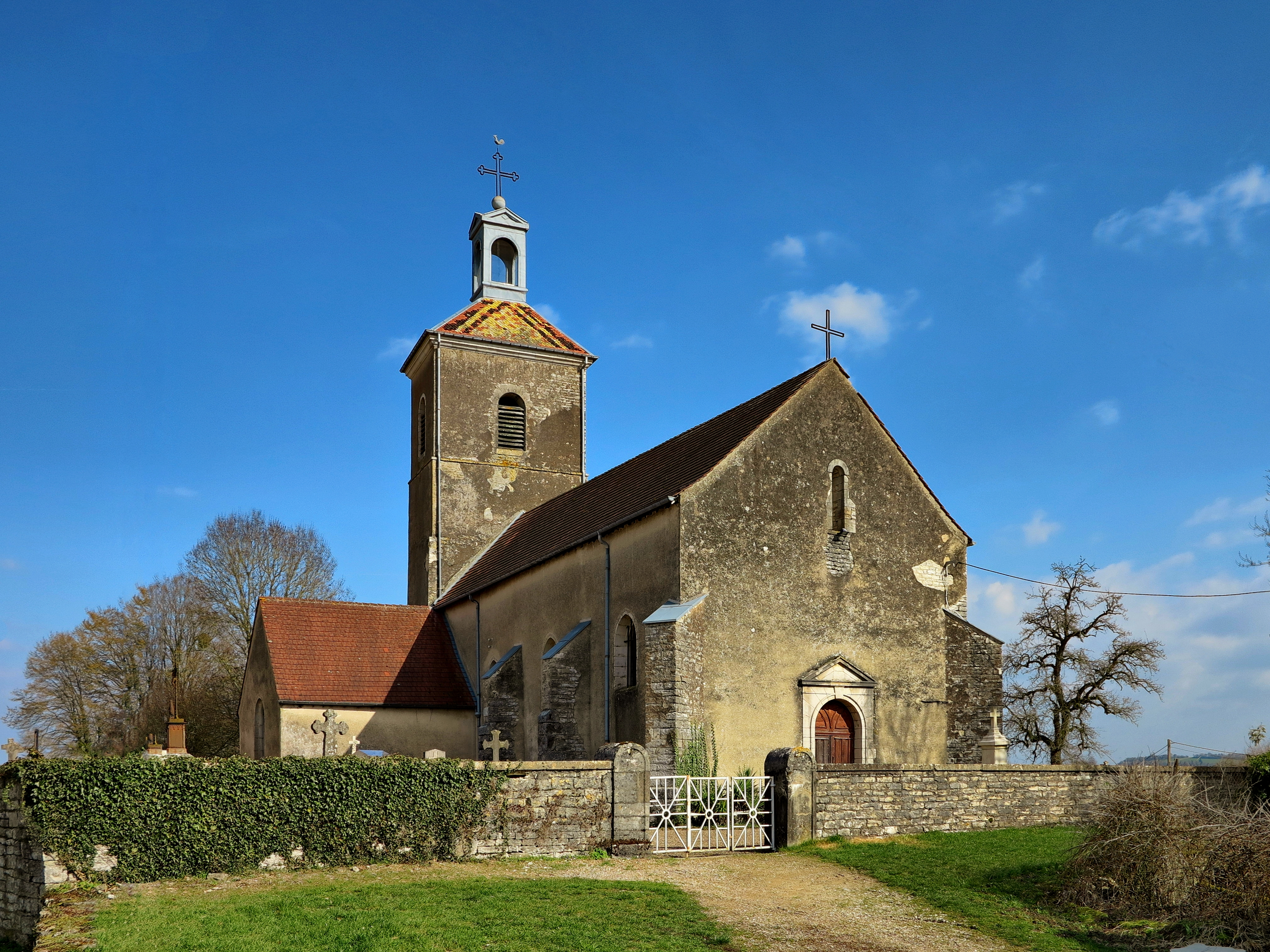 L'église